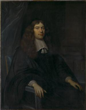 Gillis Valckenier (1623-1680), burgemeester en regent van Amsterdam